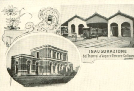 Cartolina inaugurazione tram Ferrara-Codigoro